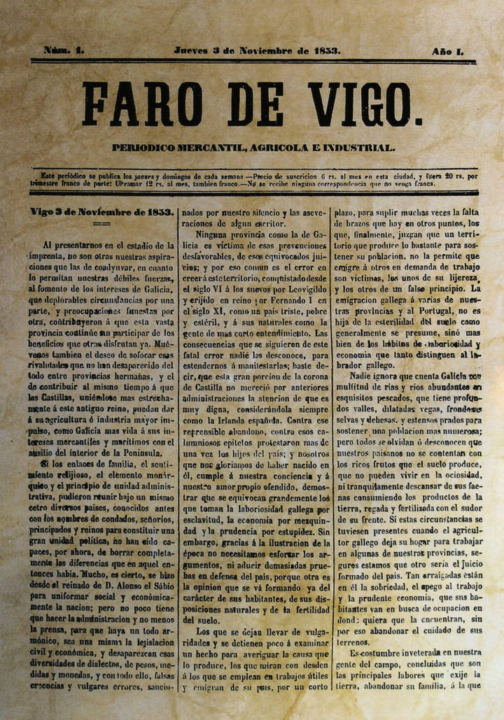 Faro de Vigo, 1853, 3 de noviembre